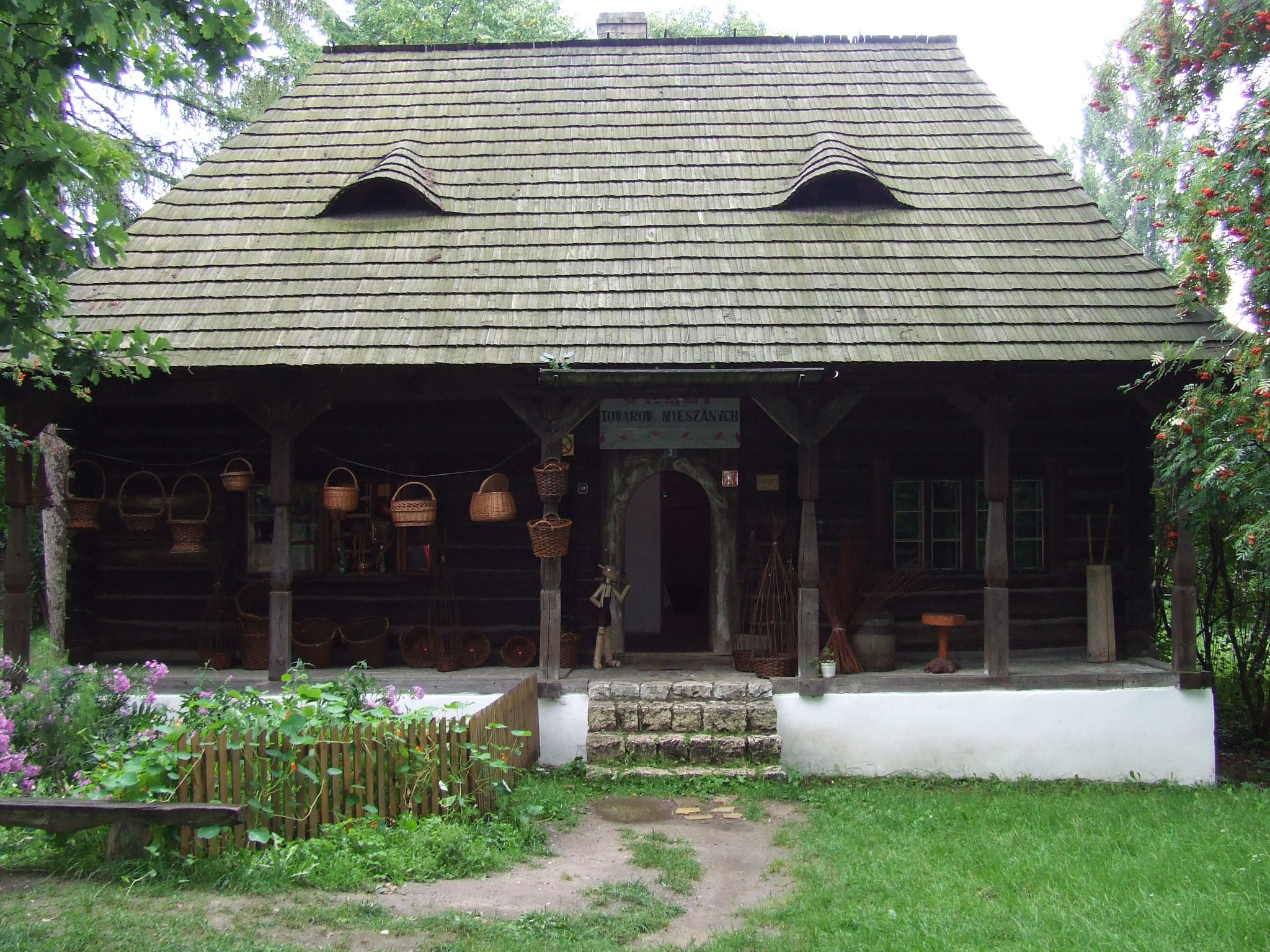 Wigiełzów, skansen, dom z Alwerni 1875 r.